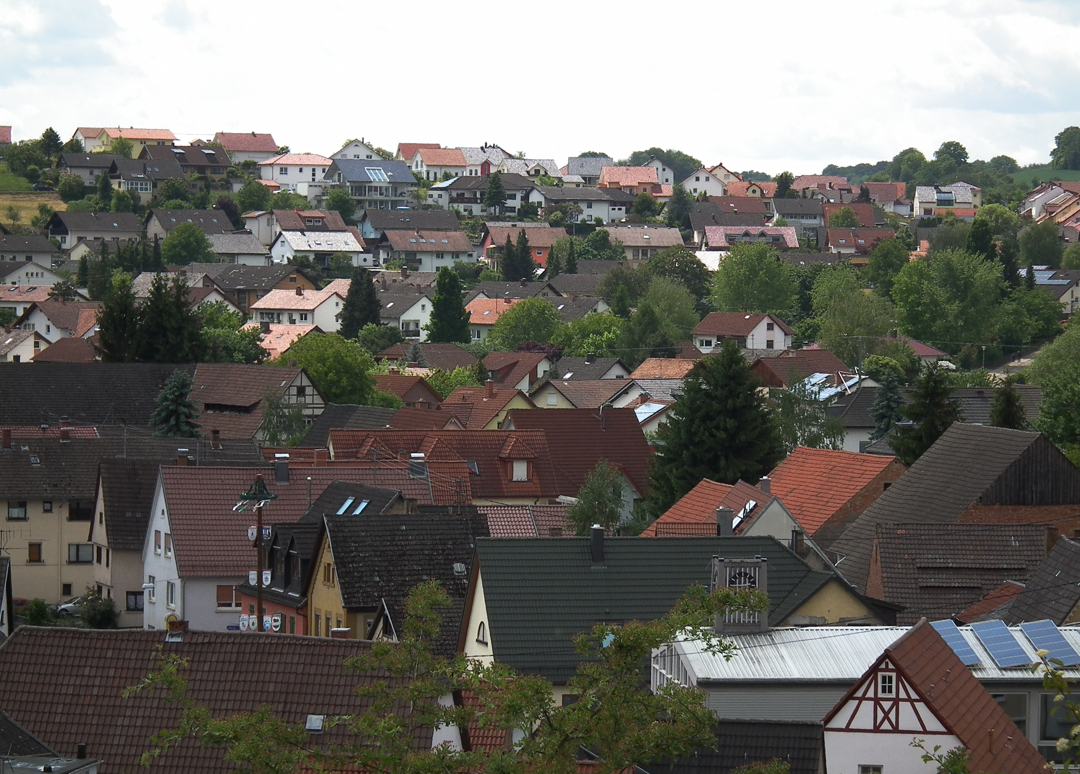 Ortsmittel von Zuzenhausen (Baden-Württemberg, Deutschland)